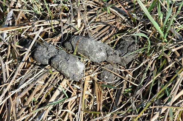 Vulpes vulpes droppings, from Commanster, Belgian High Ardennes (50°15'20``N,5°59'58``E)